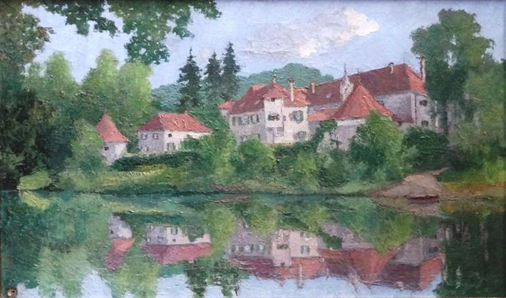 Otočec Castle, Slovenia.